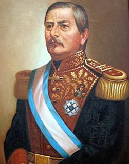 Era conocido por su preocupación por las relaciones internacionales y se le atribuye la introducción de la producción de café a el Salvador, acelerando la propagación a través de Centroamérica. El café se convirtió en la base de la economía de el Salvador